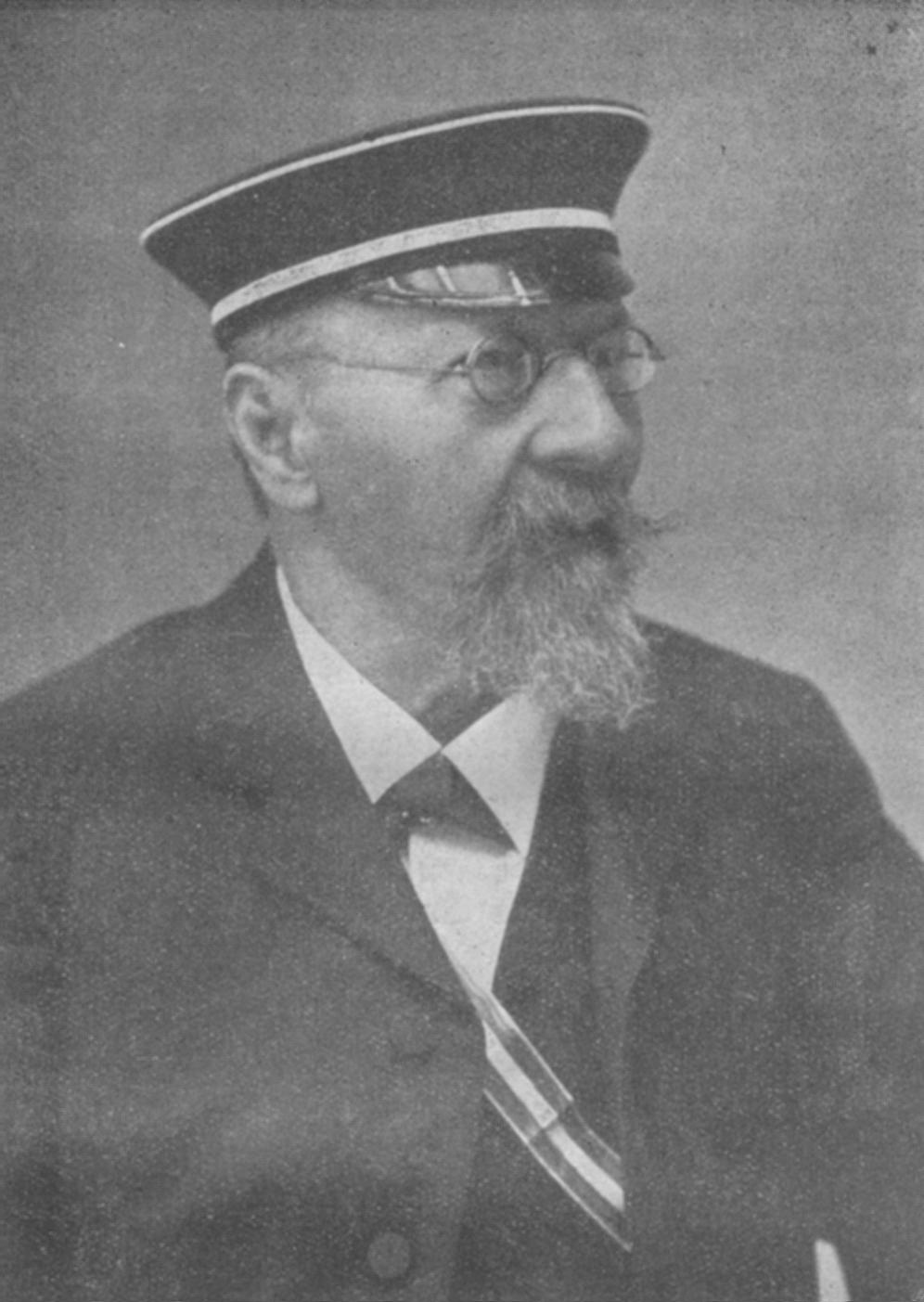 Porträtfotografie von Ludwig Hörmann von Hörbach